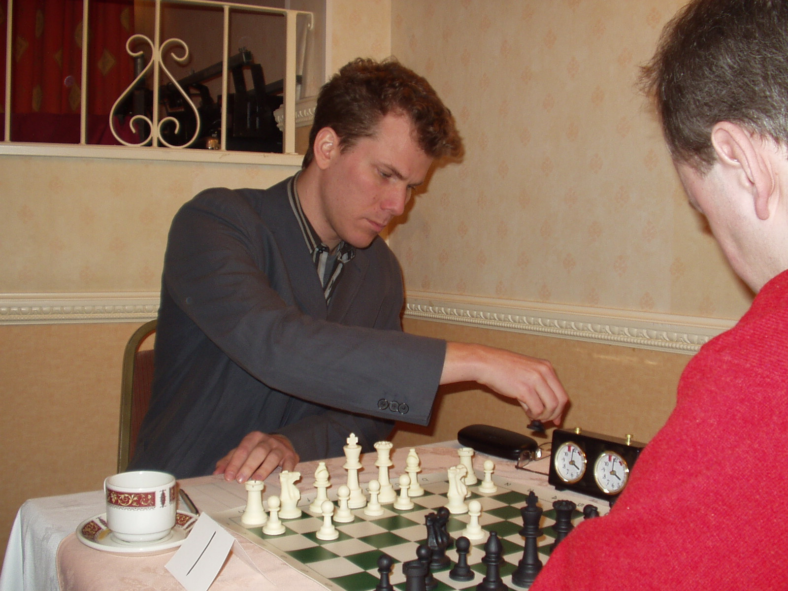 GM Tiger Hillarp-Persson (Sweden)